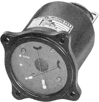 Das Anzeigerät für Funknavigation AFN2 enthält zwei Drehspuhlmeßwerke, von denen das einen auf eninen waagerecht, das andere auf einen senkrecht angeordneten Zeiger wirkt. Der senkrechte zeiger wird für Kursanzeige, der waagerechte für die Anzeige der Empfänger-Ausgangsspannung benutzt. Die in der Mitte der Skala sichtbare, in den Anschlußstecker des AFN2 eingebaute Anzeigeglimmlampe, bleibt unbenutzt für EZ6.